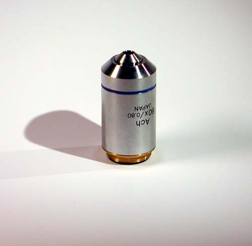 Das Okular die Linse des Mikroskops